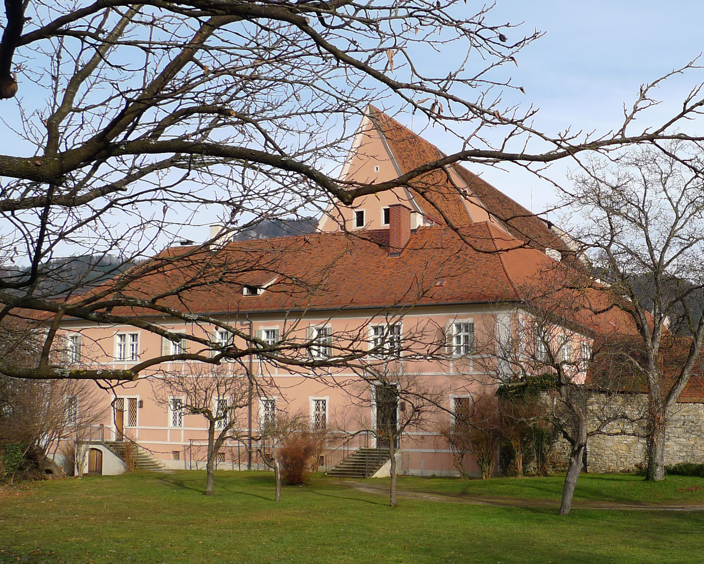 Franziskanerkloster (ehem. Servitenkloster), ehem. Wehrmauer u. Reste v. Vorgänger- bzw. abgekommener Bauten